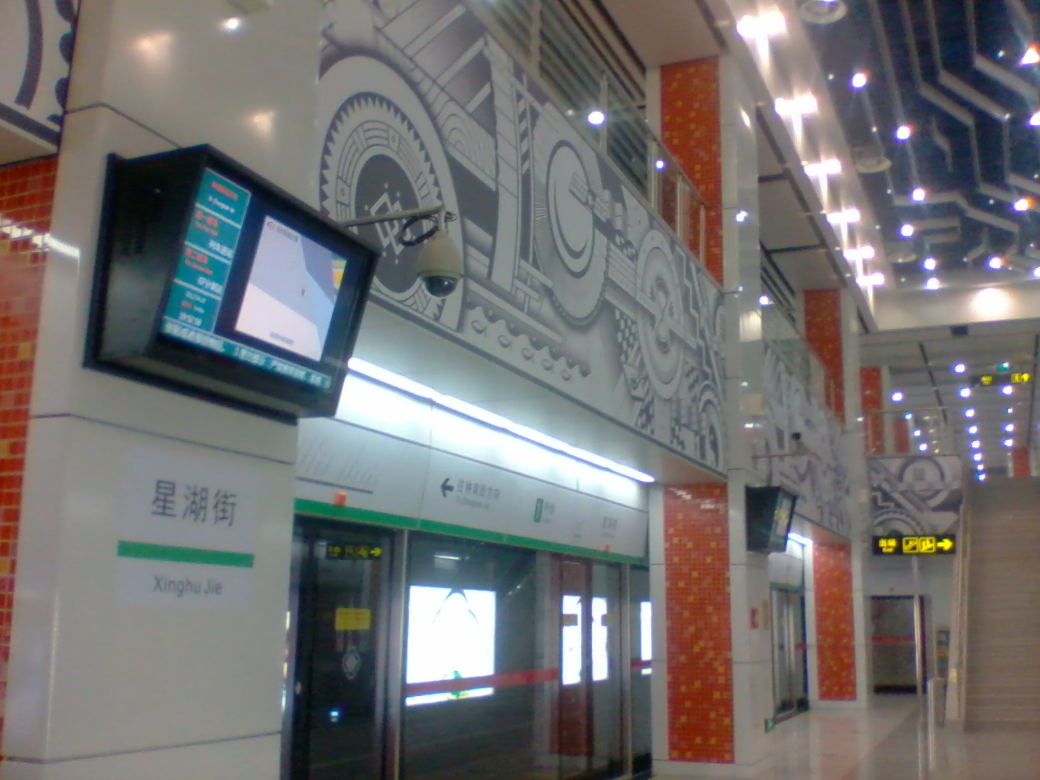 苏州地铁星湖街站内部，Huhaoyu321摄影于2012年4月29日